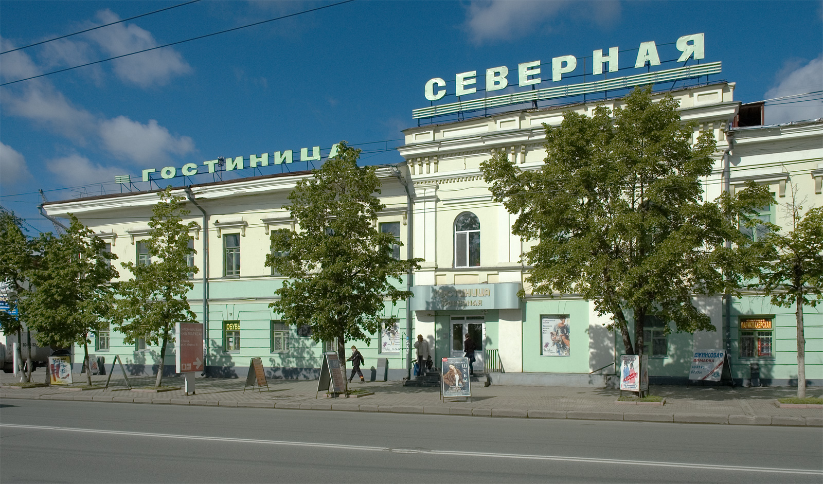 Гостиница "Северная", Томск, пр. Ленина 86